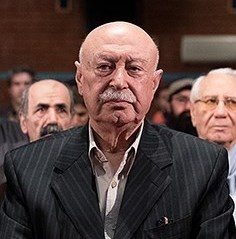 نشست هم اندیشی شورای خانه موسیقی